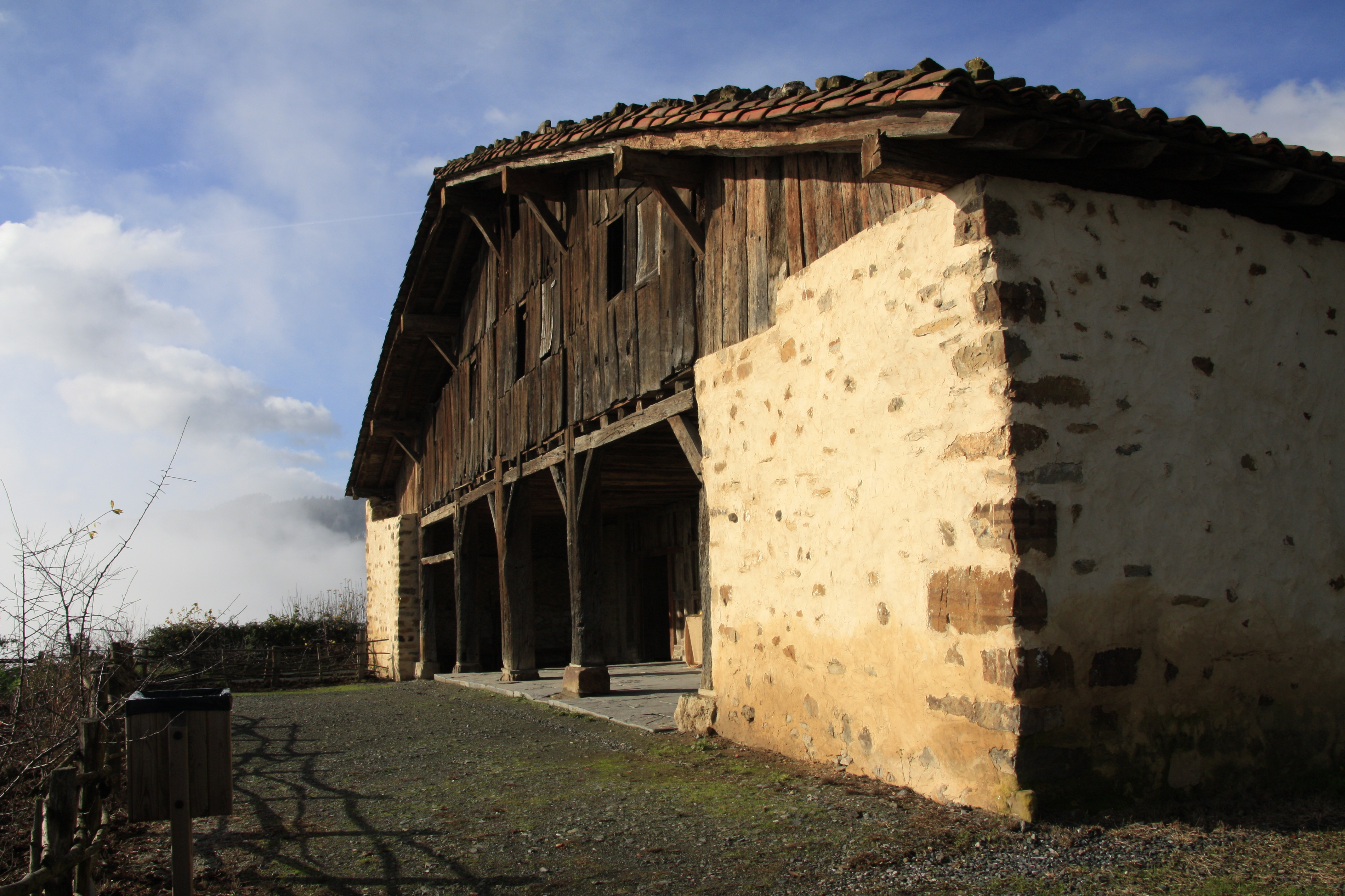 Ezkio-Itsasoko Igartubeiti baserria.